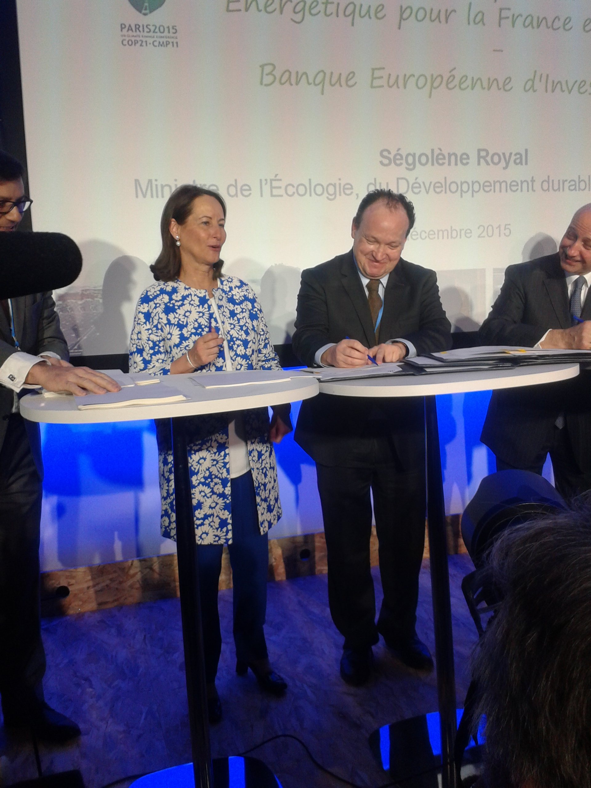 Signature à la COP 21 du partenariat pour la transition énergétique entre la France et la Banque européenne d'investissement : la ministre de l’Écologie, du Développement Durable et de l’Énergie Ségolène Royal et le vice-président de la BEI Ambroise Fayolle.